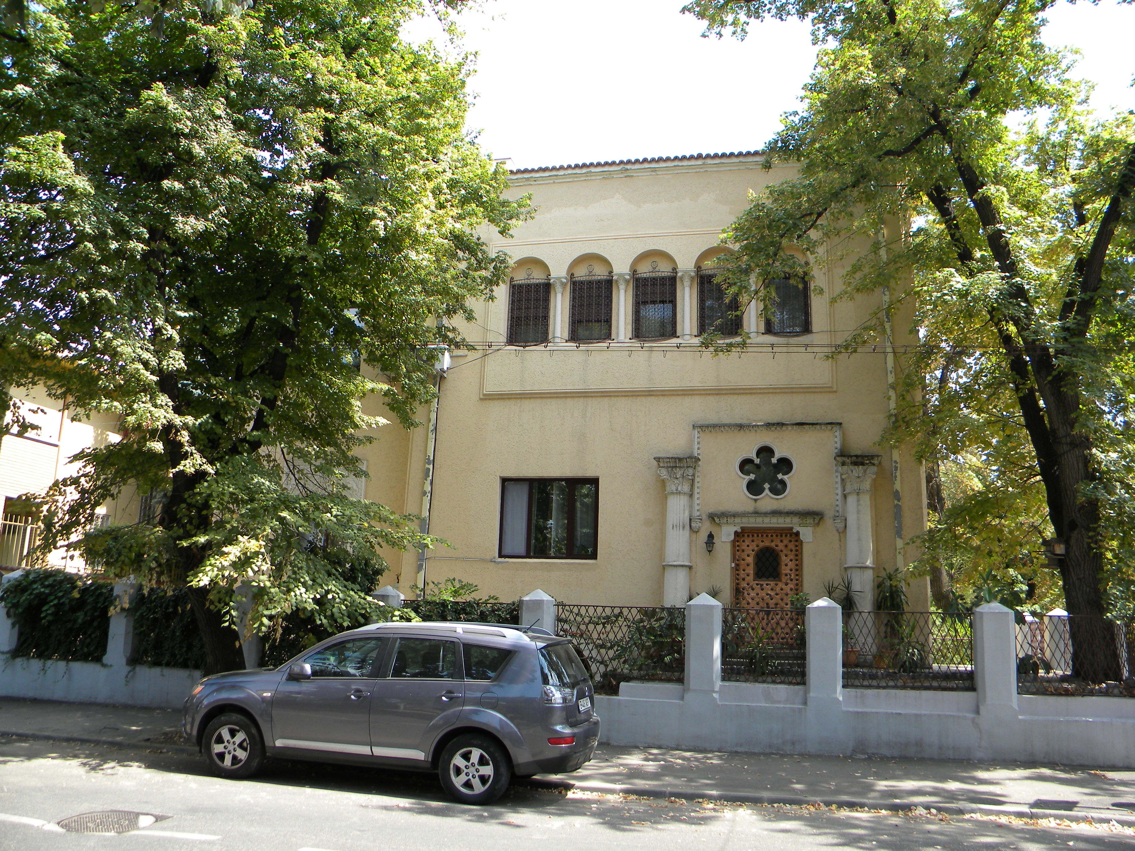 Imobil pe Str. Atena, nr. 8, Bucuresti sect. 1